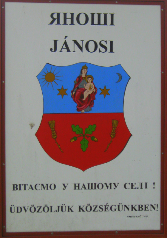 Въезд в село Яноши в Береговском районе Закарпатской области Украины.